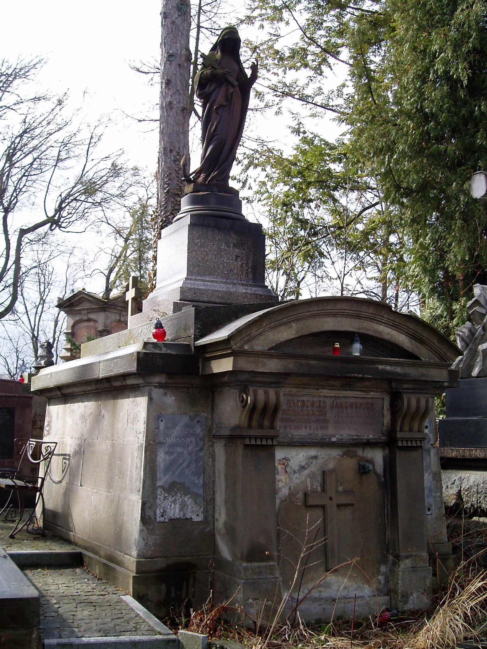 Гробівець родини Яновських.